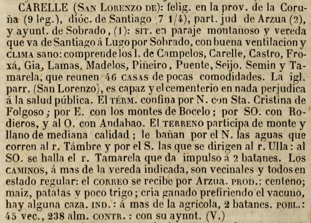 Carelle no Diccionario geográfico-estadístico-histórico de España y sus posesiones de Ultramar.